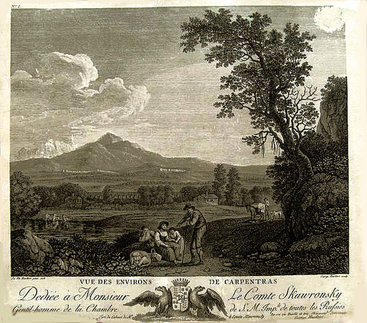 Gravure de Georges Abraham Hackert d'après une peinture de Jacob Philippe Hackert 4e quart du XVIIIe siècle Musée de Vendôme